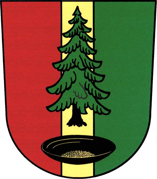 Znak obce Horská Kvilda